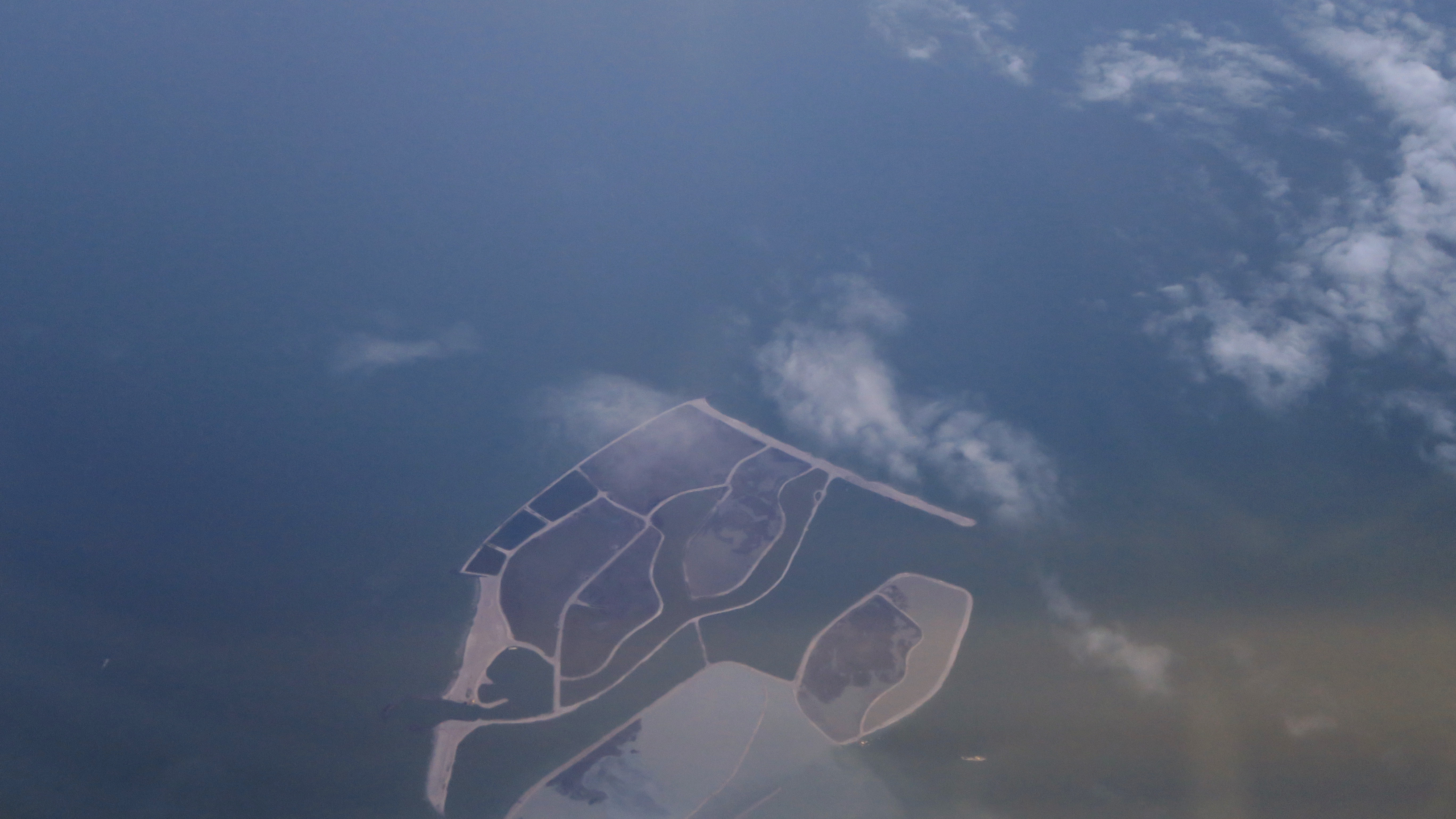 Markerwadden, gezien naar het noordwesten